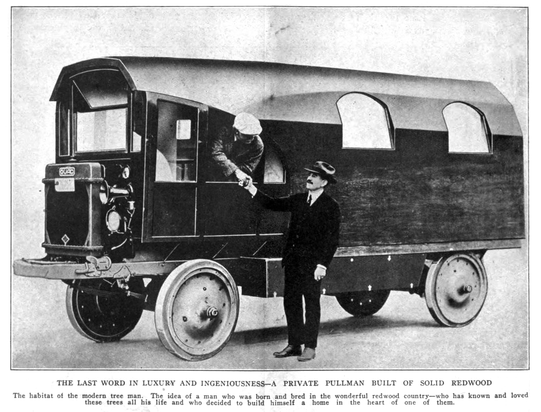 Charles Kellogg's Travel Log